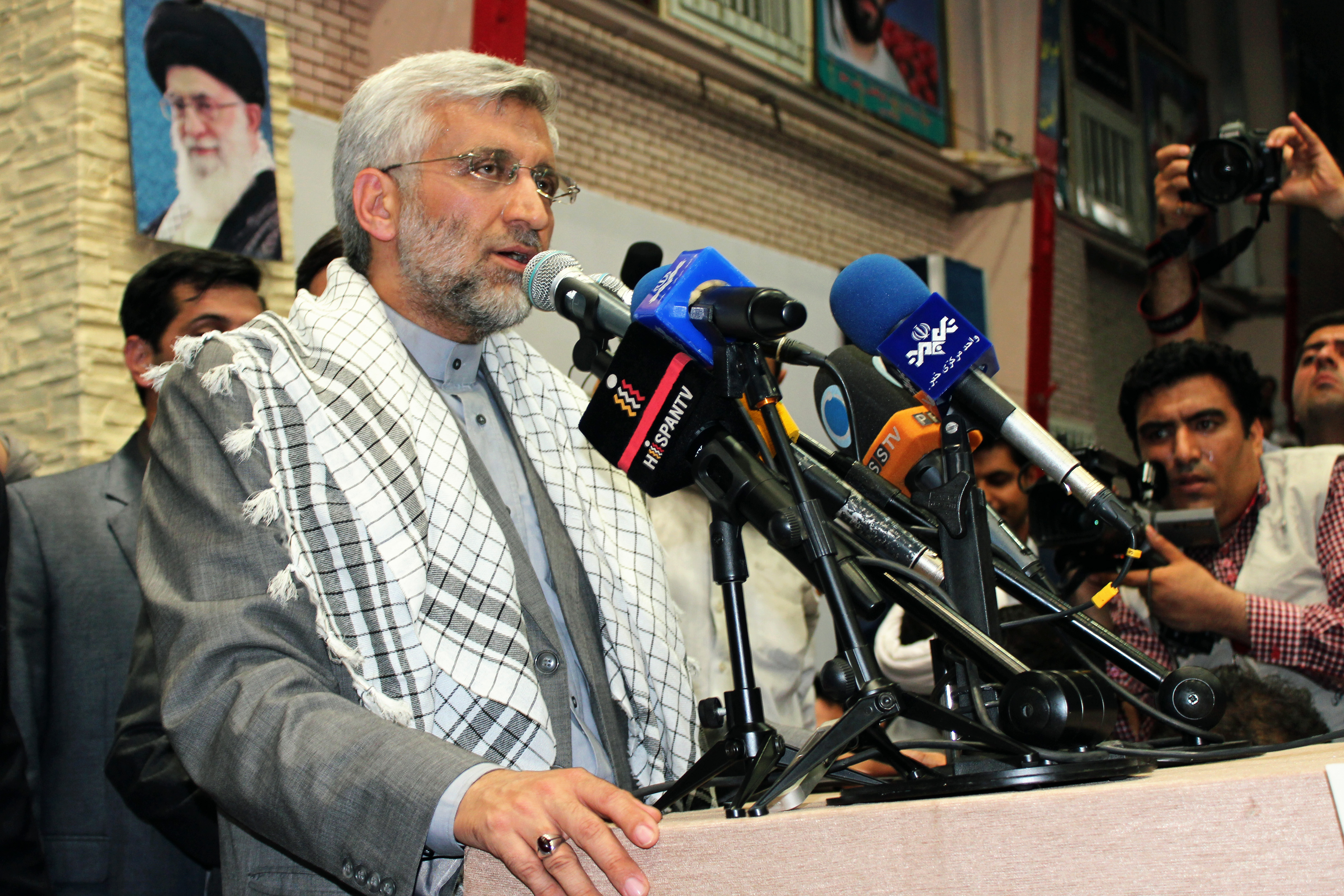 دکتر سعید جلیلی در سفر انتخاباتی مشهد تاریخ ۲۰ خرداد ۱۳۹۲